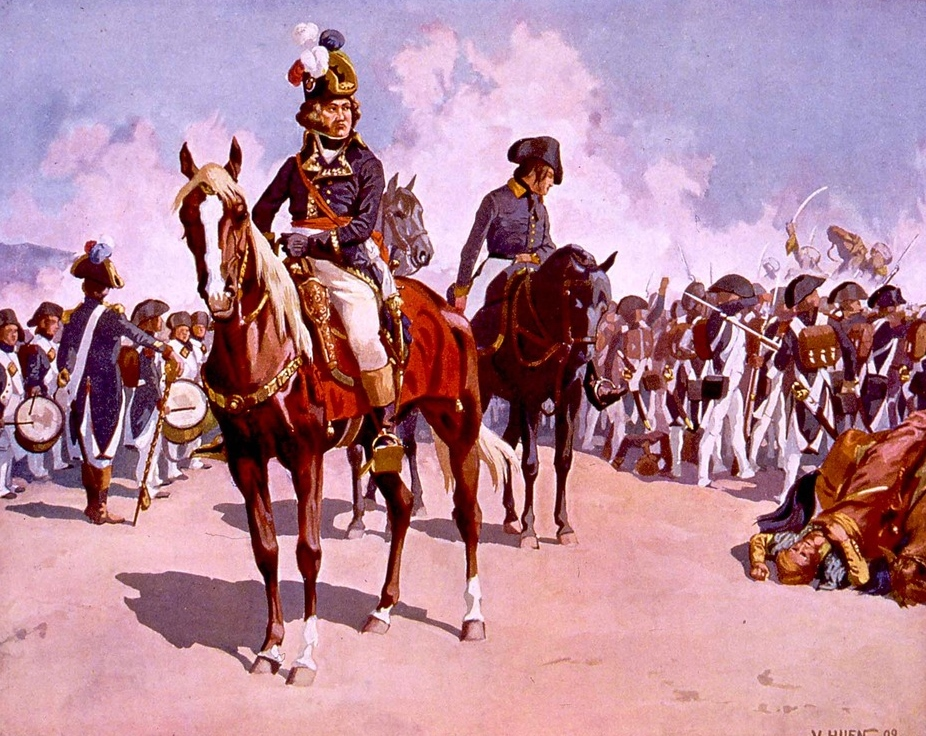 « Kléber au combat d'Héliopolis ». Lors de la bataille d'Héliopolis, le 20 mars 1800, le général Kléber, commandant en chef les troupes françaises d'Égypte, écrase une armée ottomane qui marchait sur Le Caire.